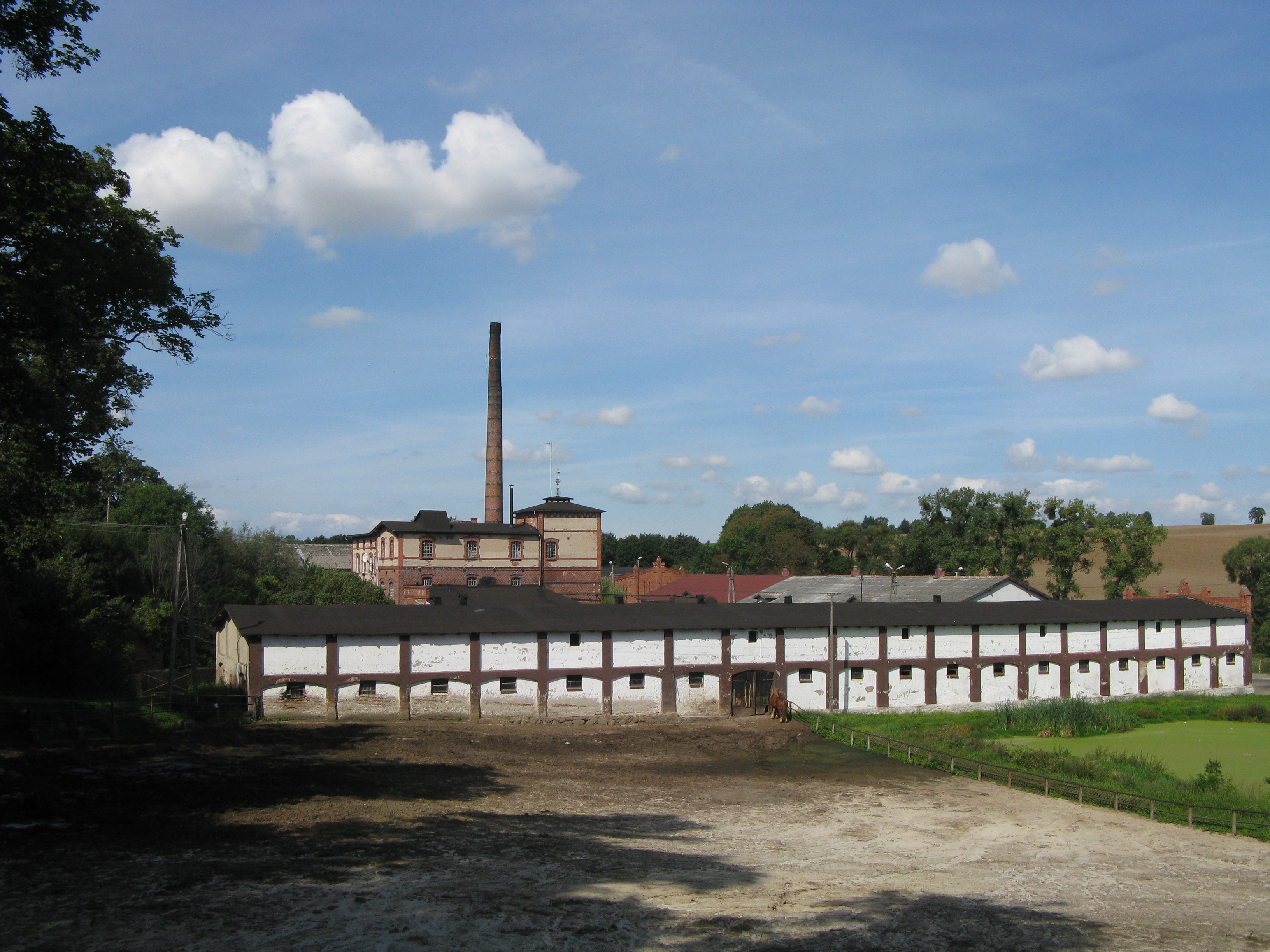 Zabudowania zespołu dworskiego w Mędrzycach : stajnia i gorzelnia